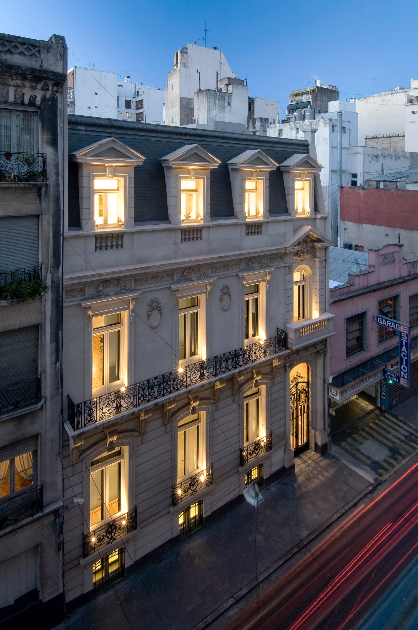 Grupo Insud